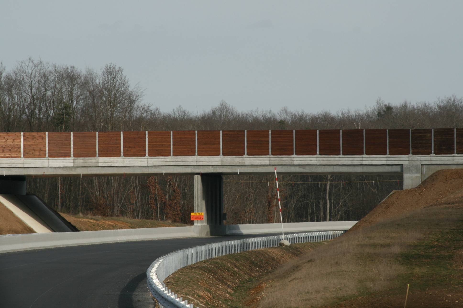 Autoroute A19 – Ouvrage dédié au passage de la faune